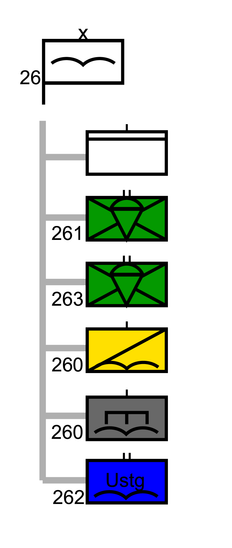 Gliederung Luftlandebrigade 26 im deutschen Heeres.